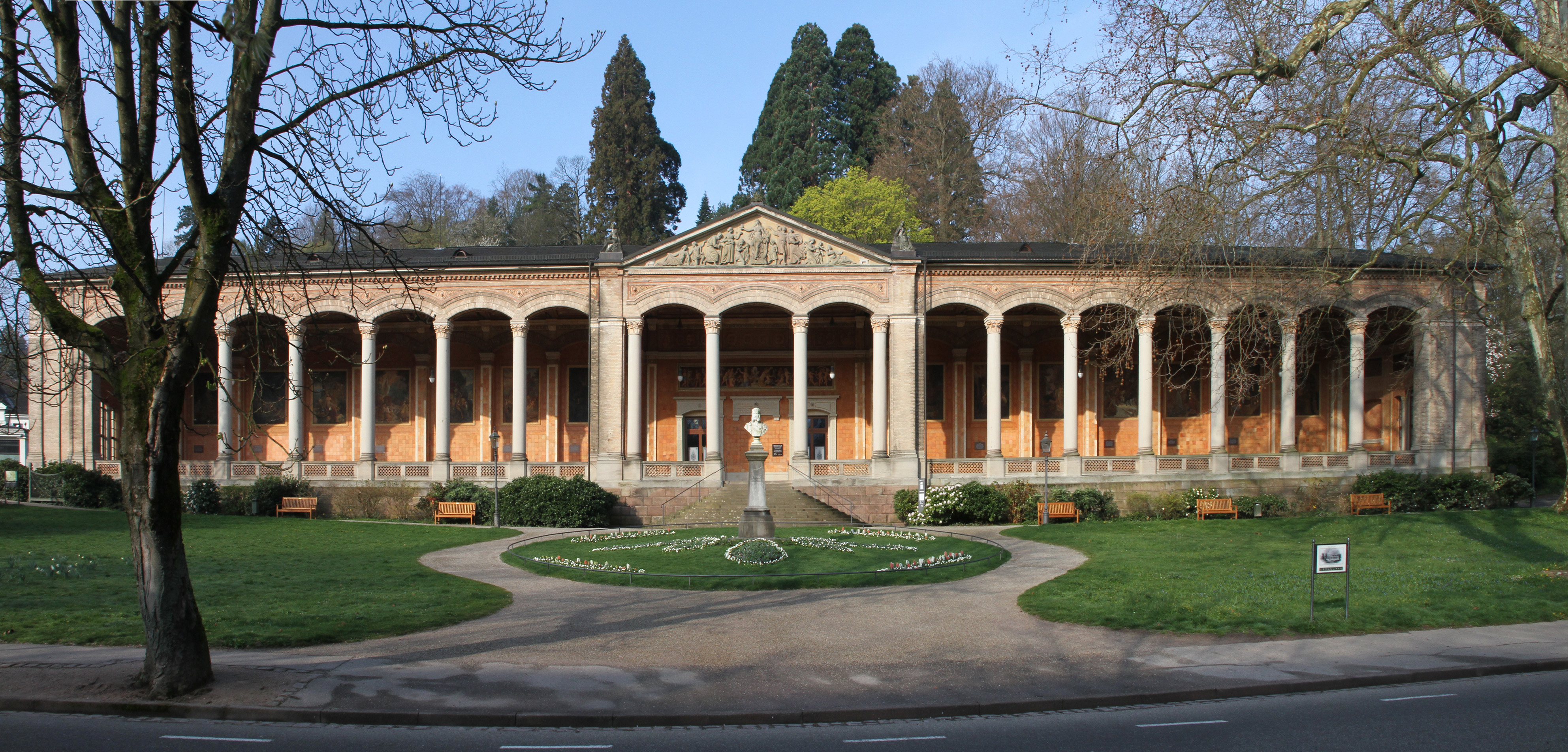 Trinkhalle Baden-Baden.